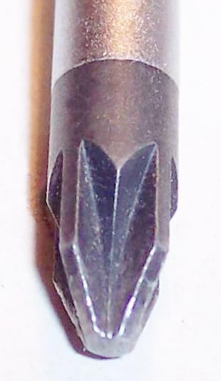 Pozidrivschraubendreher (Original text: Pozidriv-Schraubendreher)